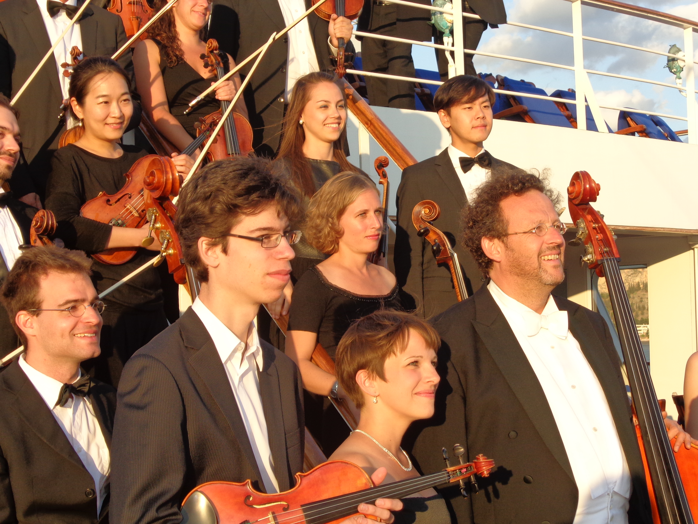 Solisten, Konzertmeister und Dirigent (Mark Mast) der Bayerischen Philharmonie auf dem Kreuzfahrtschiff Deutschland